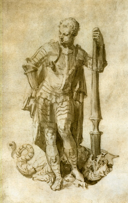 Георгій змієборець: малюнок до фрески